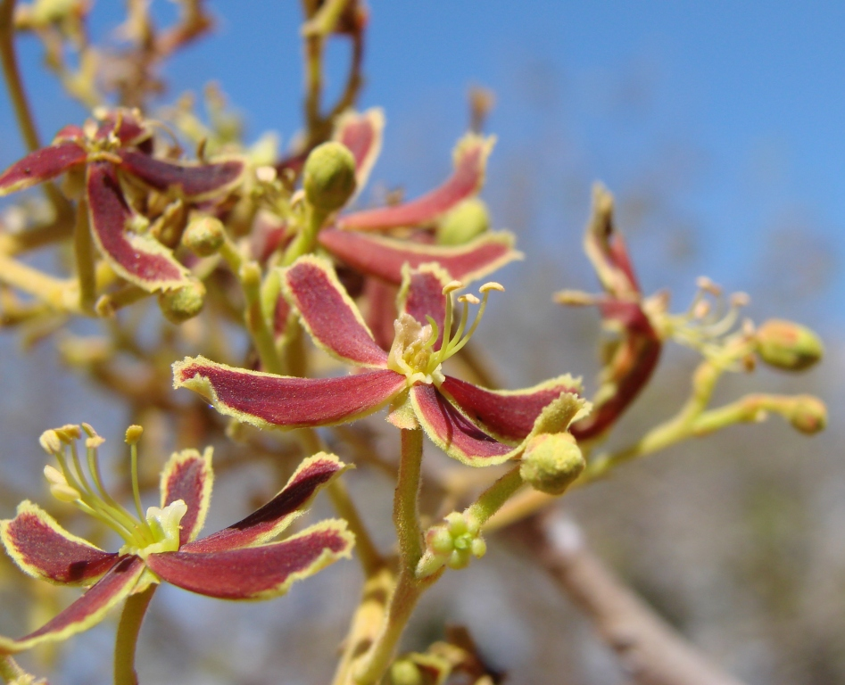 Magonia pubescens - SAPINDACEAE Formosa - Goiás - Brasil.